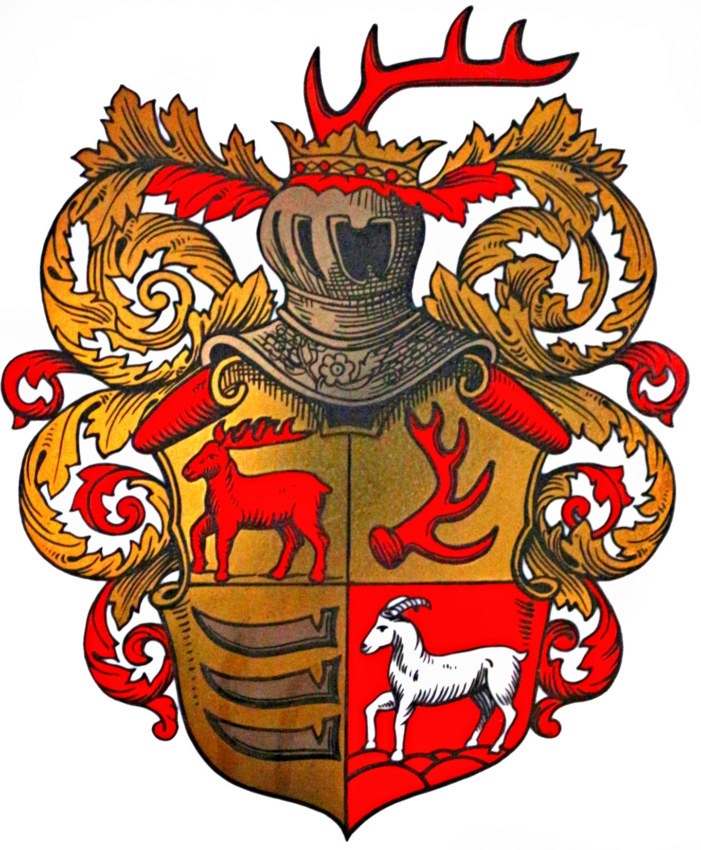 Erb rodu Biberštejnů